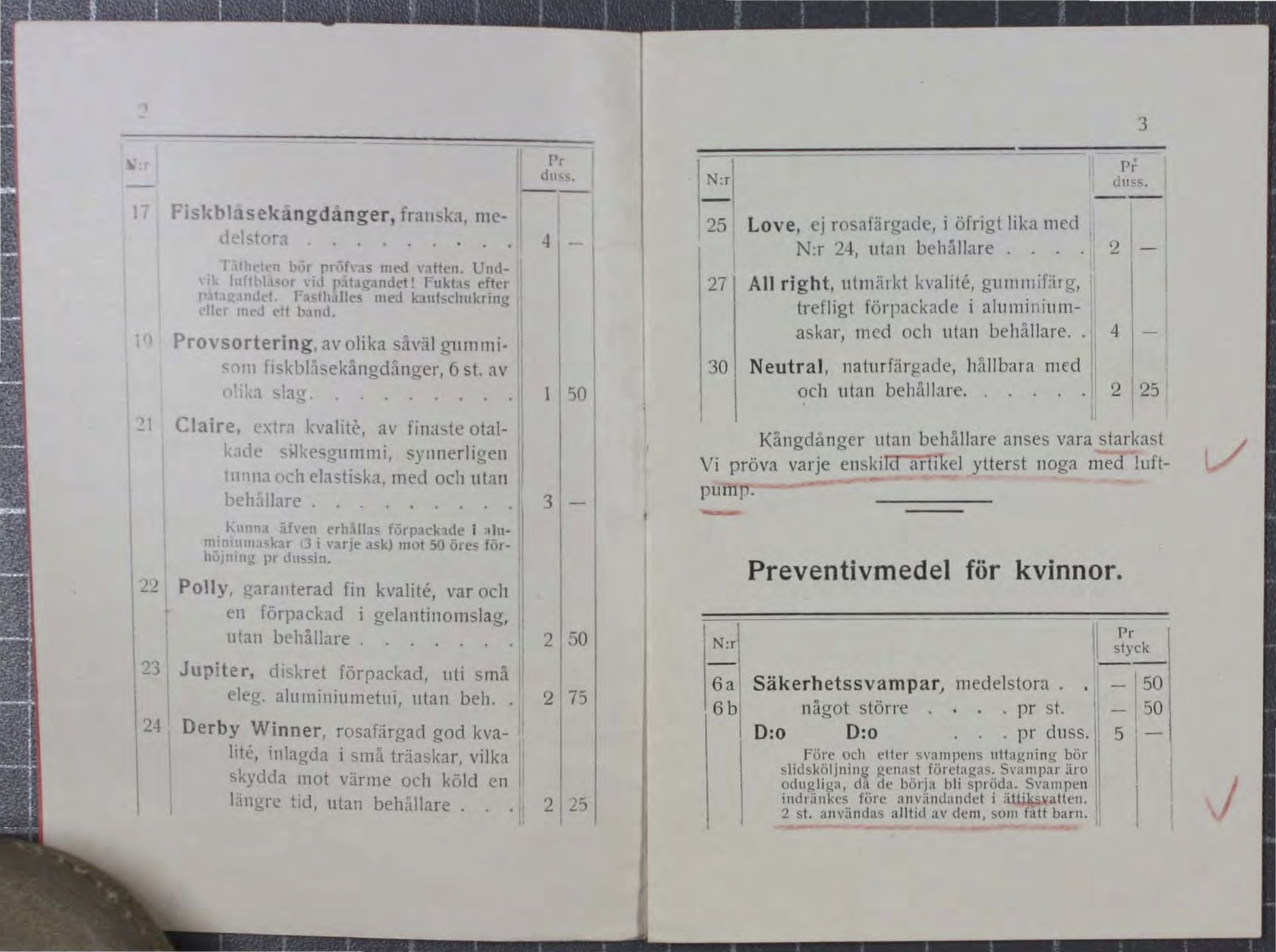 Reklamhäfte från Sällskapet för Humanitär Barnalstring 1914. Anton Nyströms exemplar